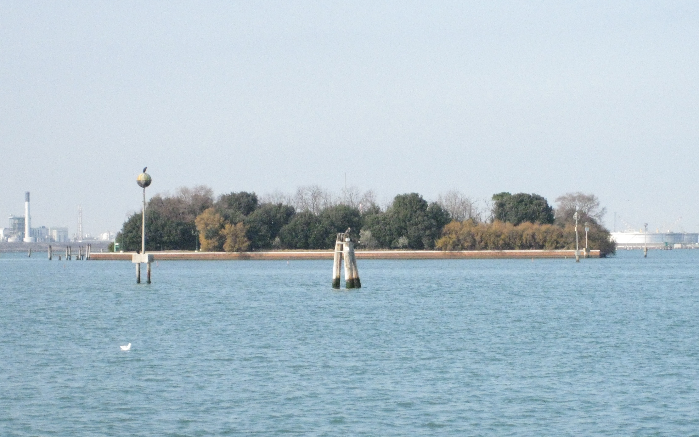 Venezia - Isola di Trezze